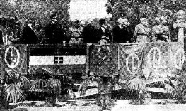 L'Alto Commissario Ecc. Grazioli alla rivLsta militare in occasione della festa dello Statuto